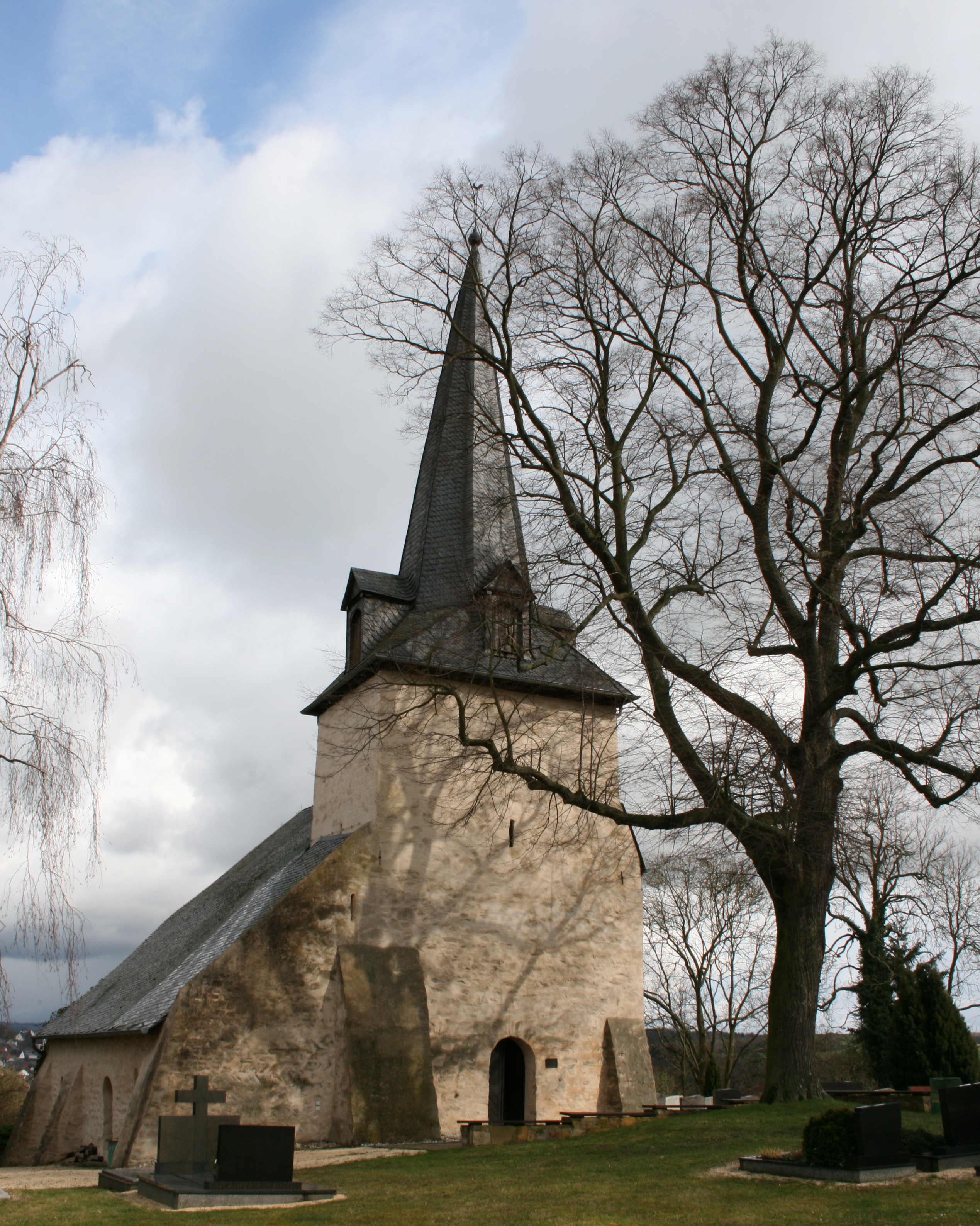 Frontansicht Berger Kirche, Werschau, Deutschland